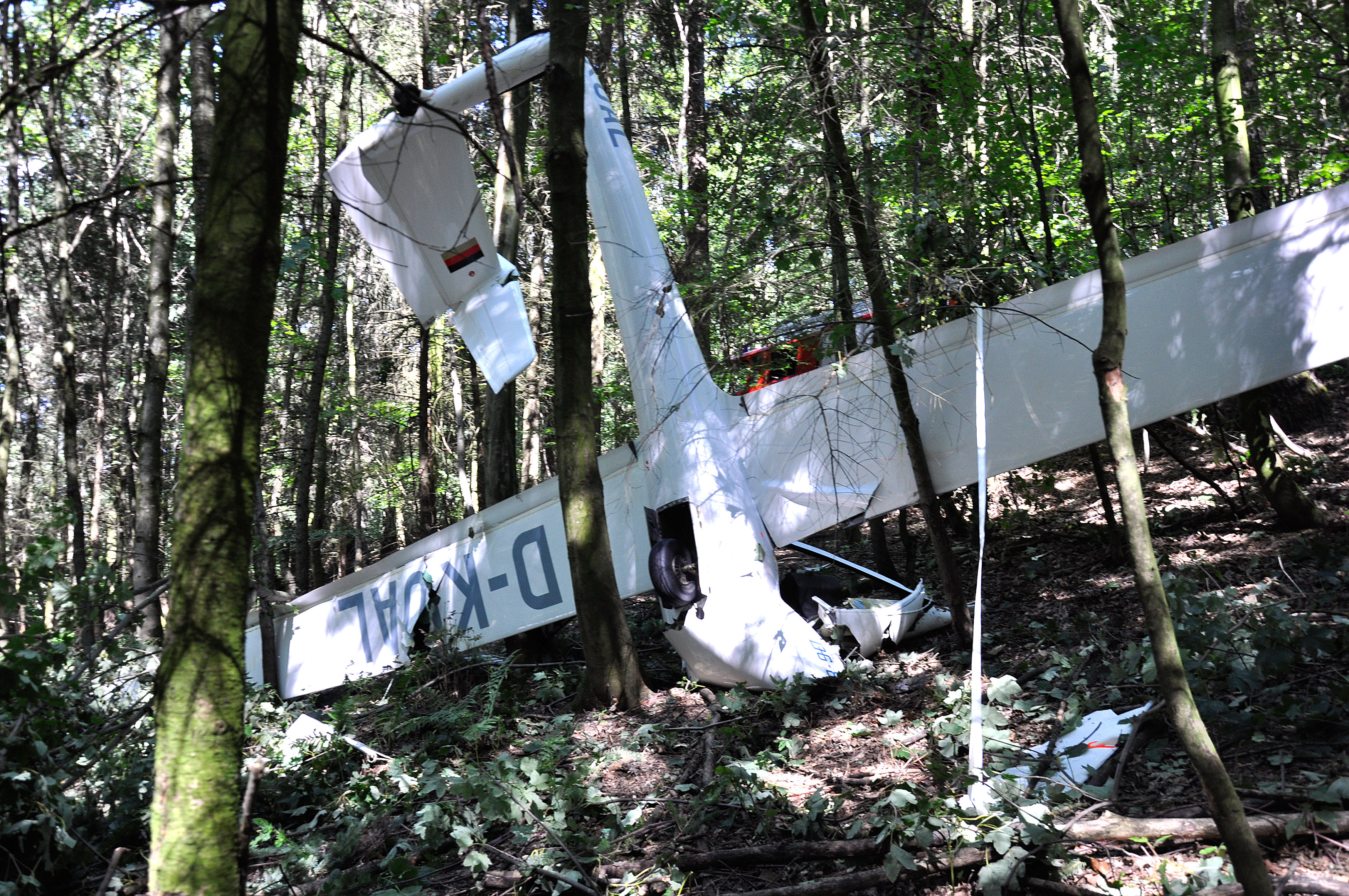 Wrack inmitten des Waldes - Bruchlandung des Segelflugzeuges im Wald am Pfennigberg bei Linz